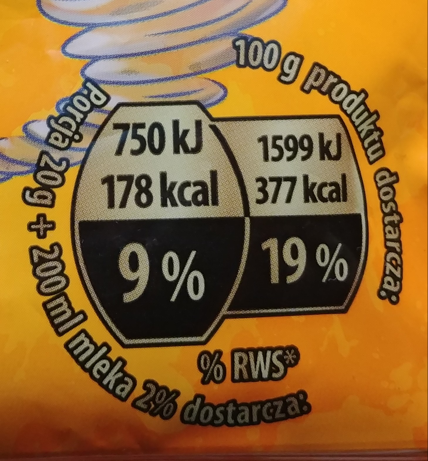 Kakao instant RWS